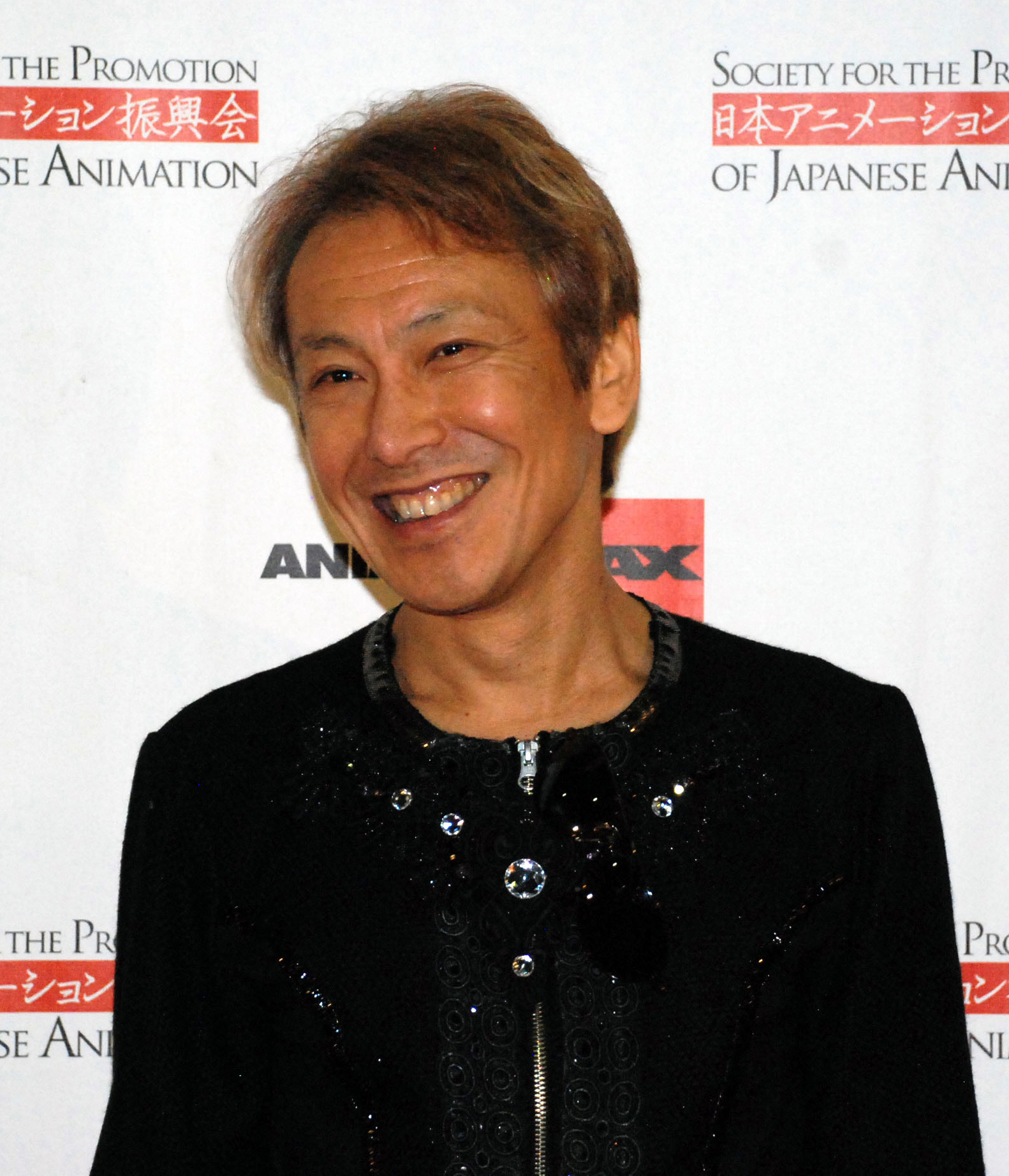 Anime Expo Dia Zero